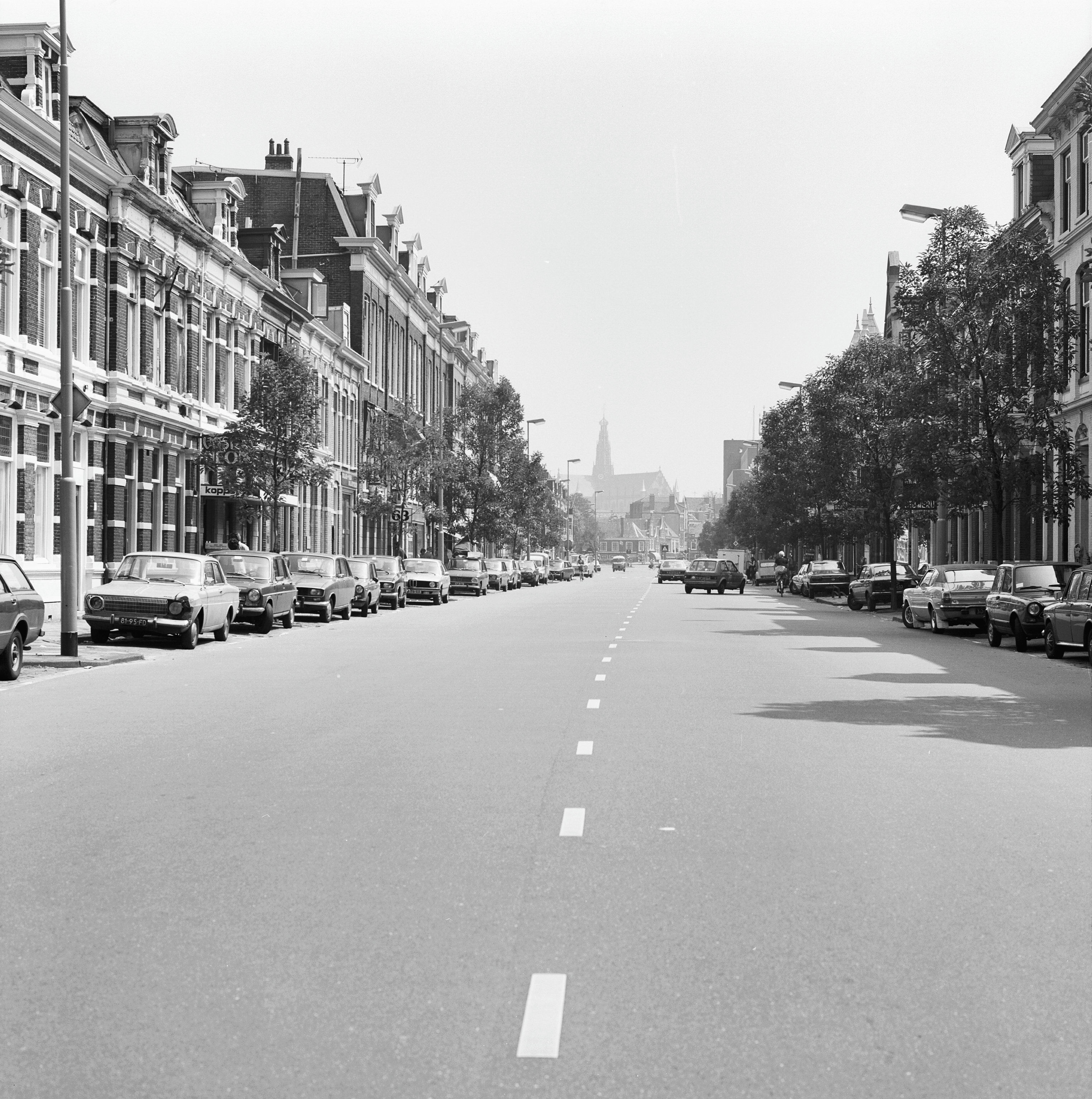 Overzichten: Zijlweg naar het oosten